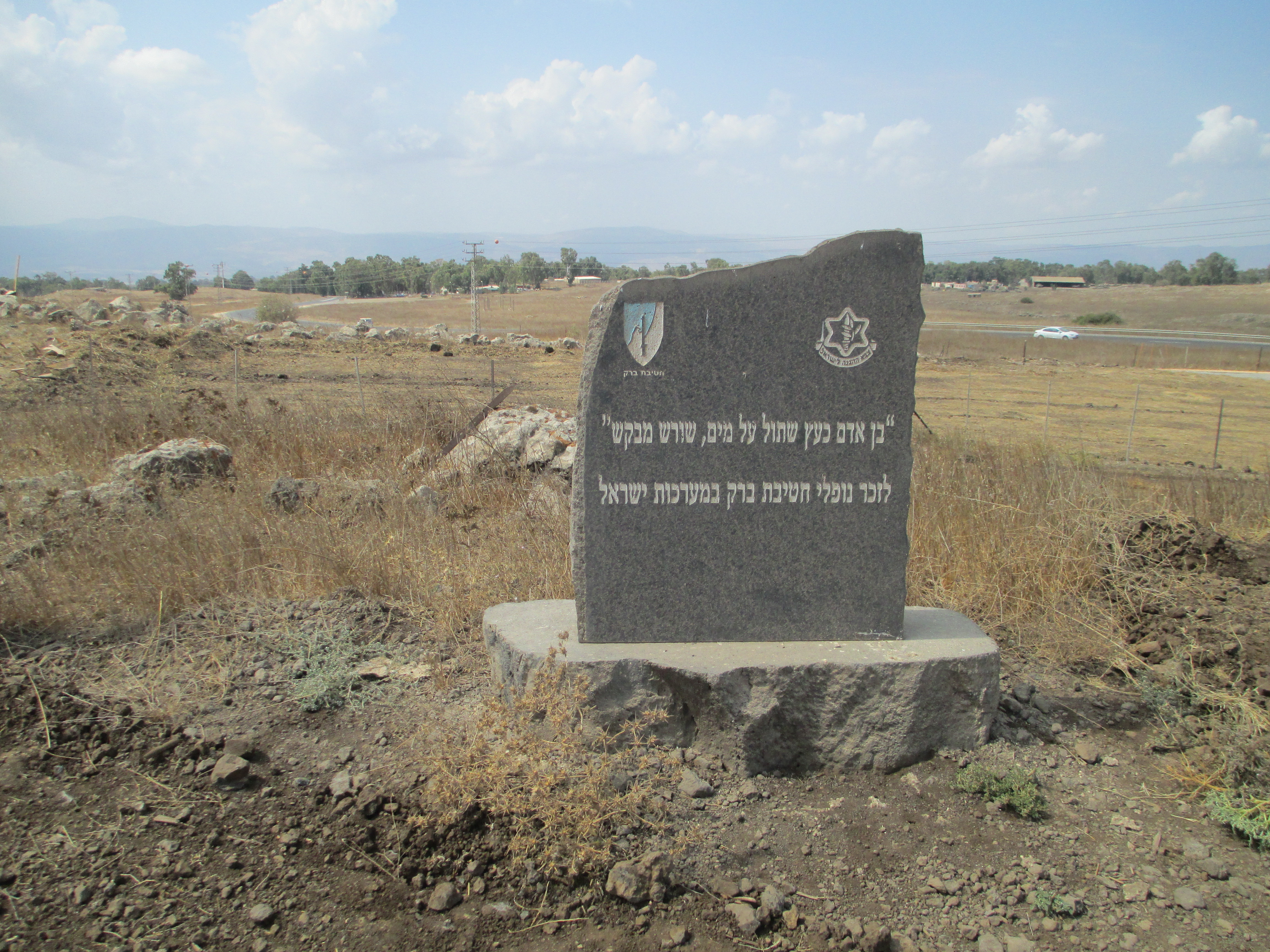 חורשת הנופלים של חטיבת ברק מול מחנה עלייקה ברמת הגולן